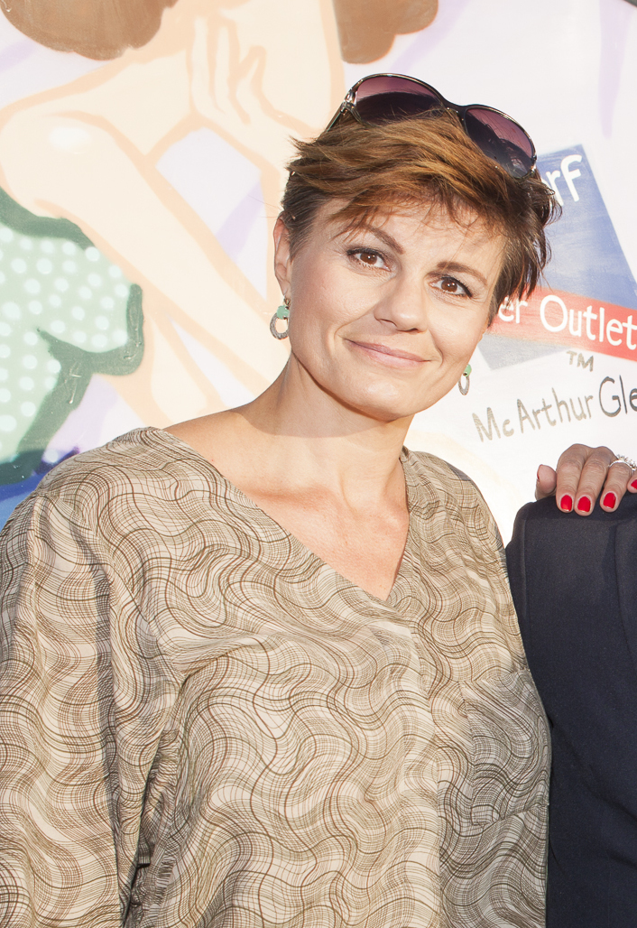 Kabarettistin Eva Maria Marold, Center Manager Mario Schwann, Gabi Fischer, Psychologin aus der Barbara Karlich Show